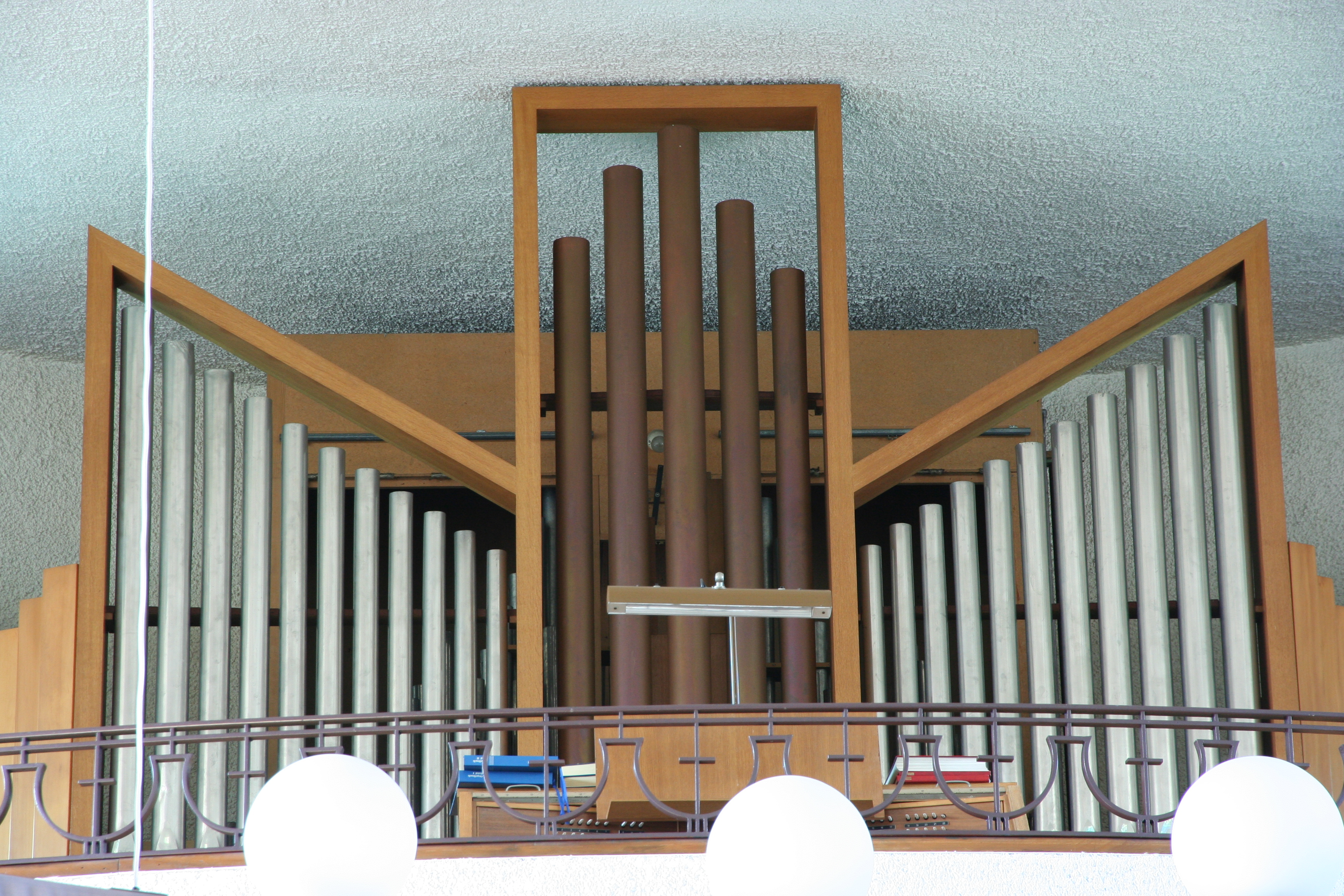 röm.-kath. Pfarrkirche St. Joseph Bussnang TG